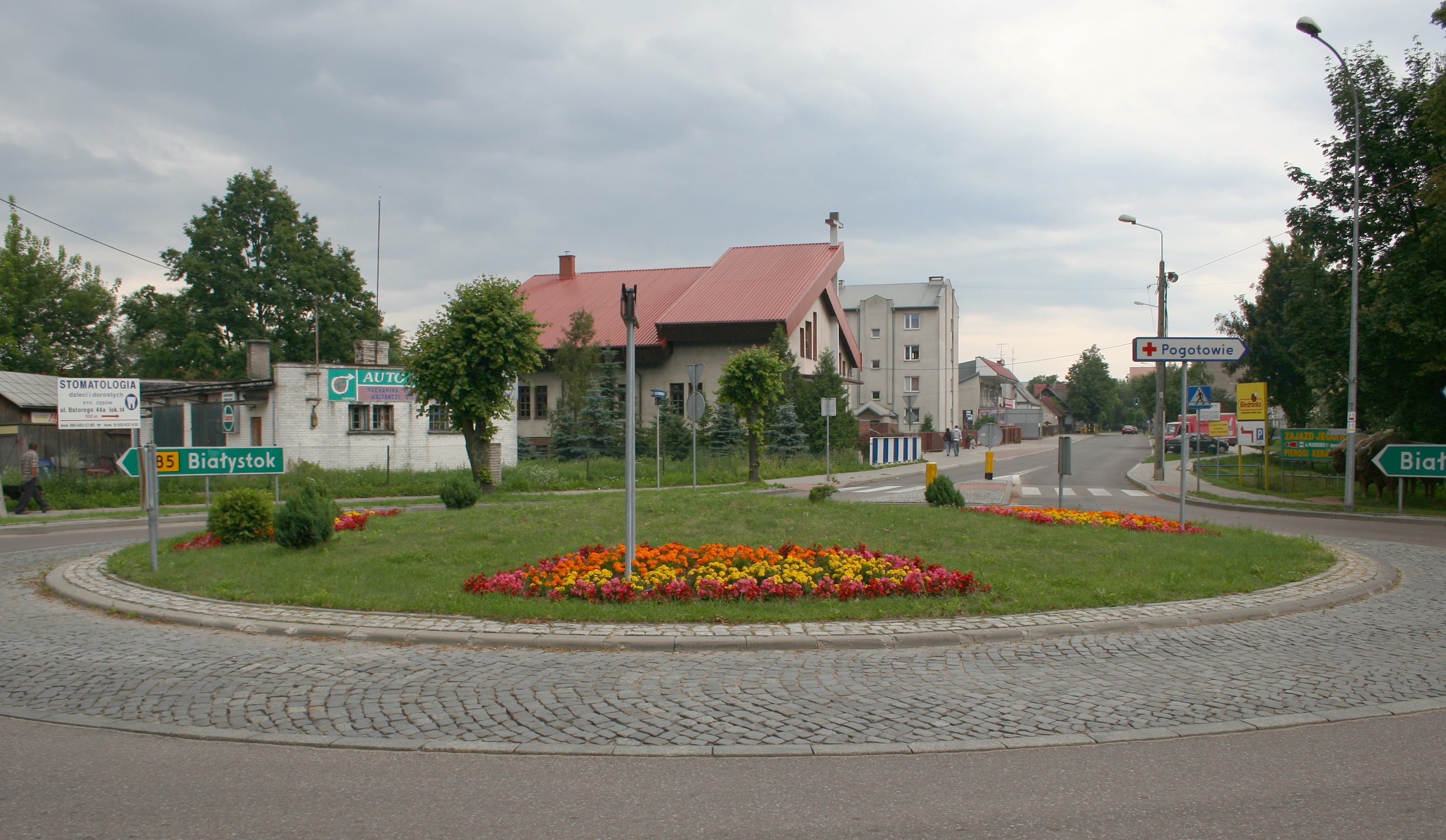 Hajnówka, rondo przy kościele baptystów